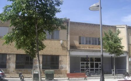 fotografia de l'ies des del carrer Antoni Maura. Manacor